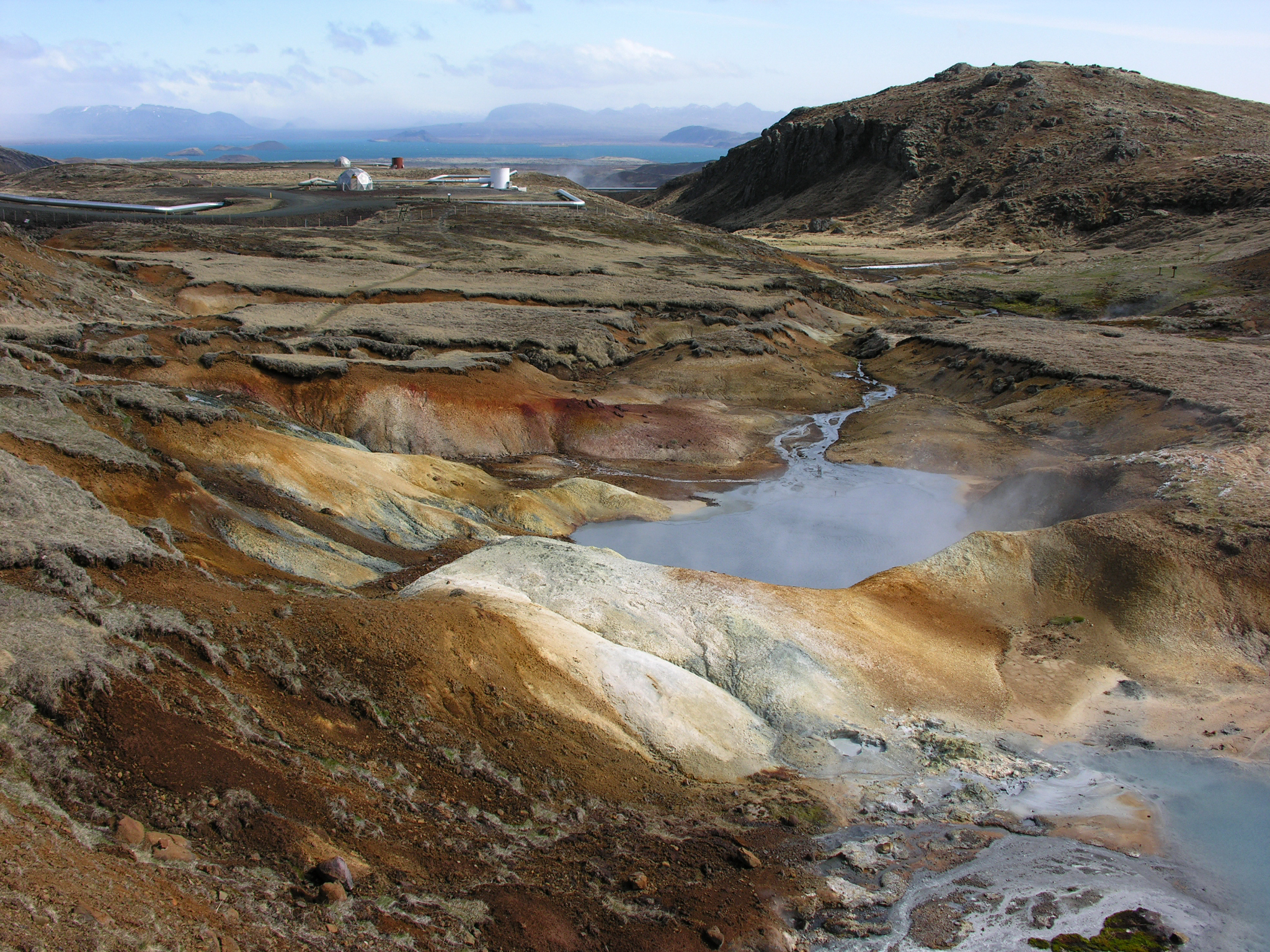 Iceland, Hengill near Nesjavallavirkjun